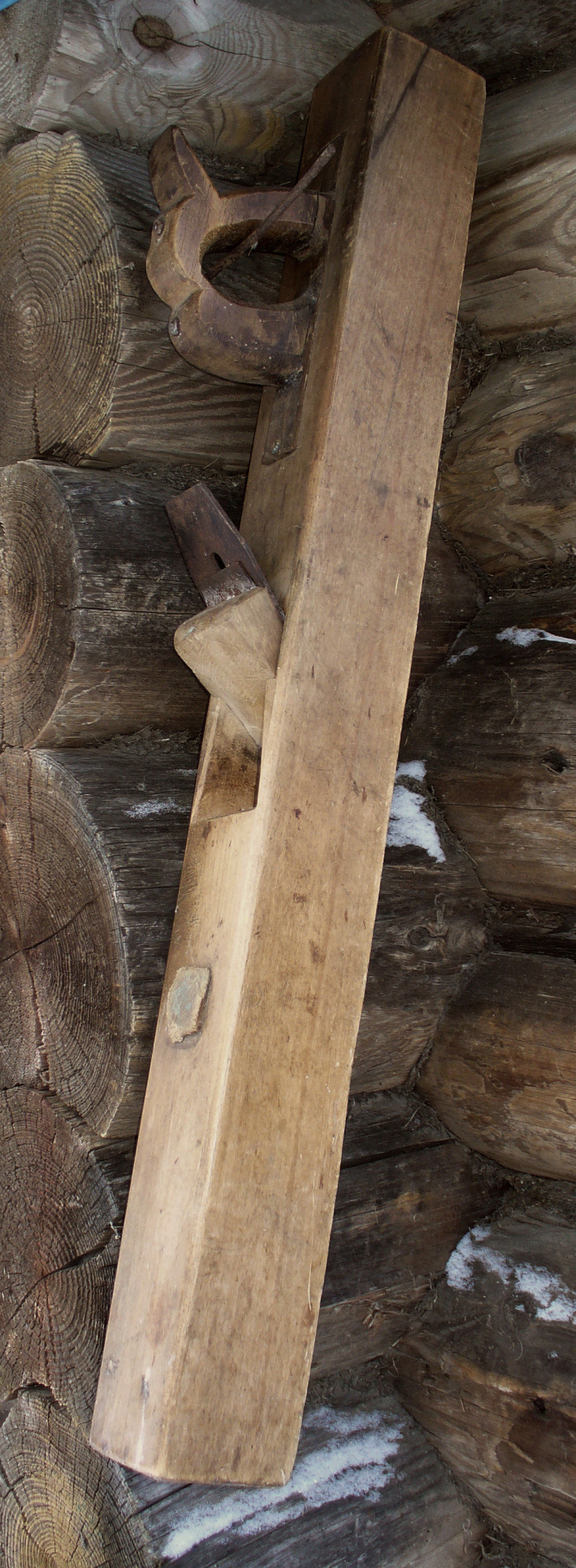 Фуганок. Середина 20 века.